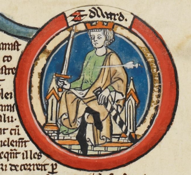 Miniature d'Édouard le Martyr dans une généalogie royale du XIVe siècle.